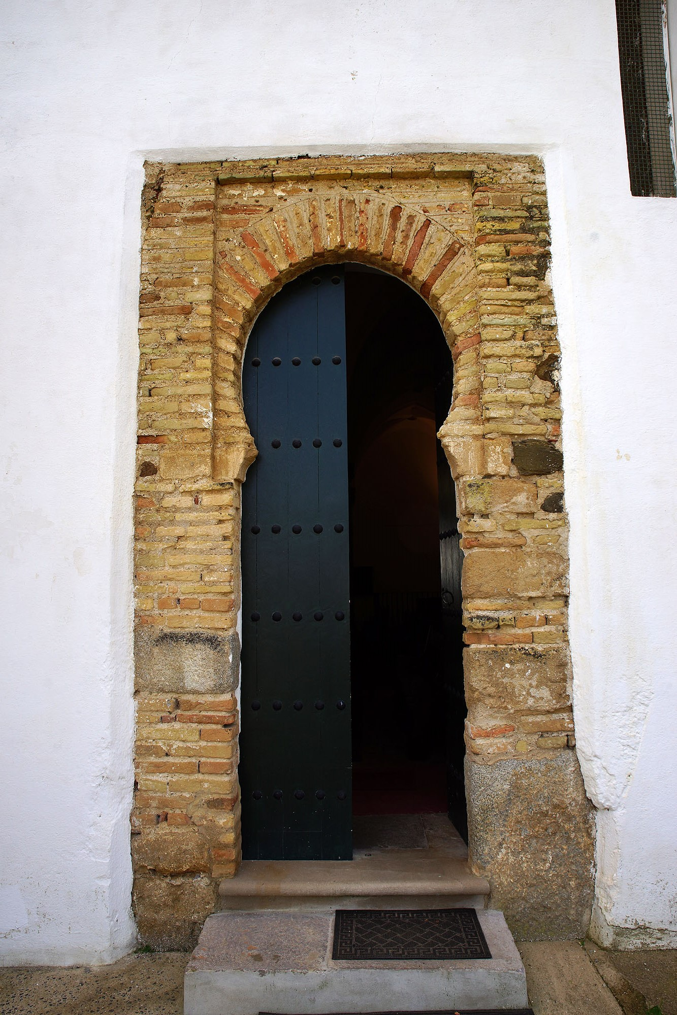 MERTOLA MERTOLA